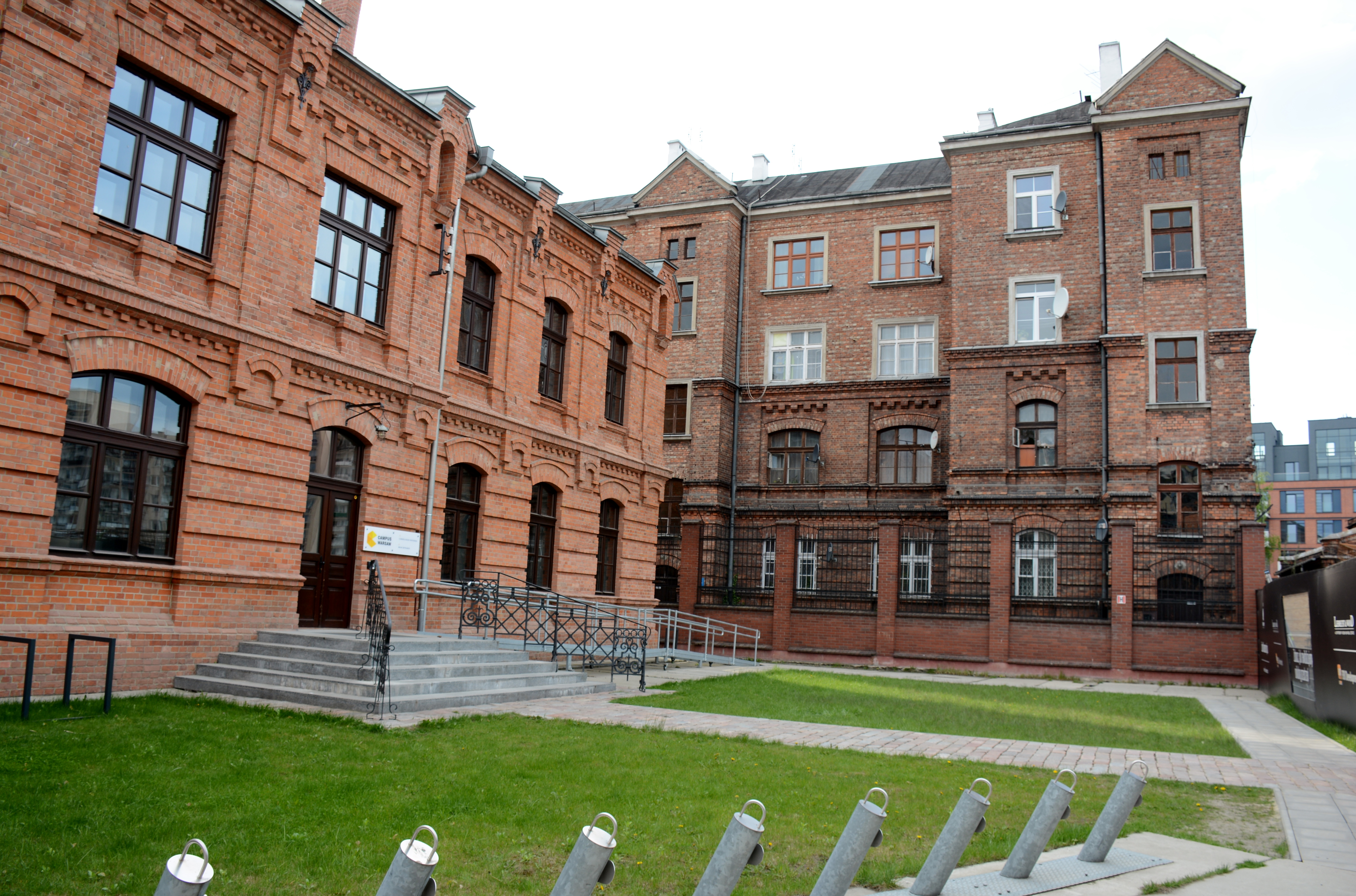 Praga, Warsaw, Poland